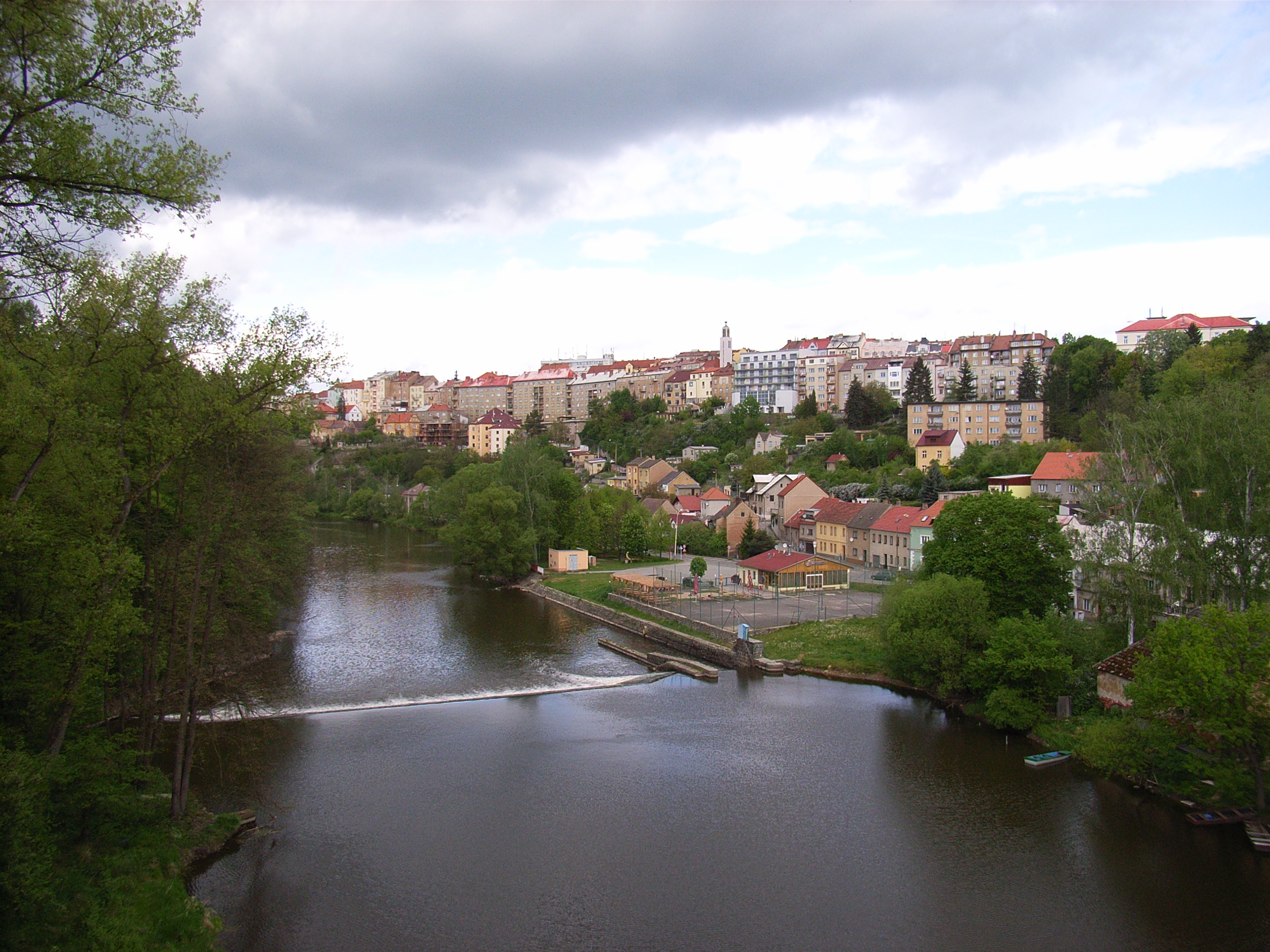 Česky: Město Tábor, pohled z mostu Bechyňské dráhy přes řeku Lužnici